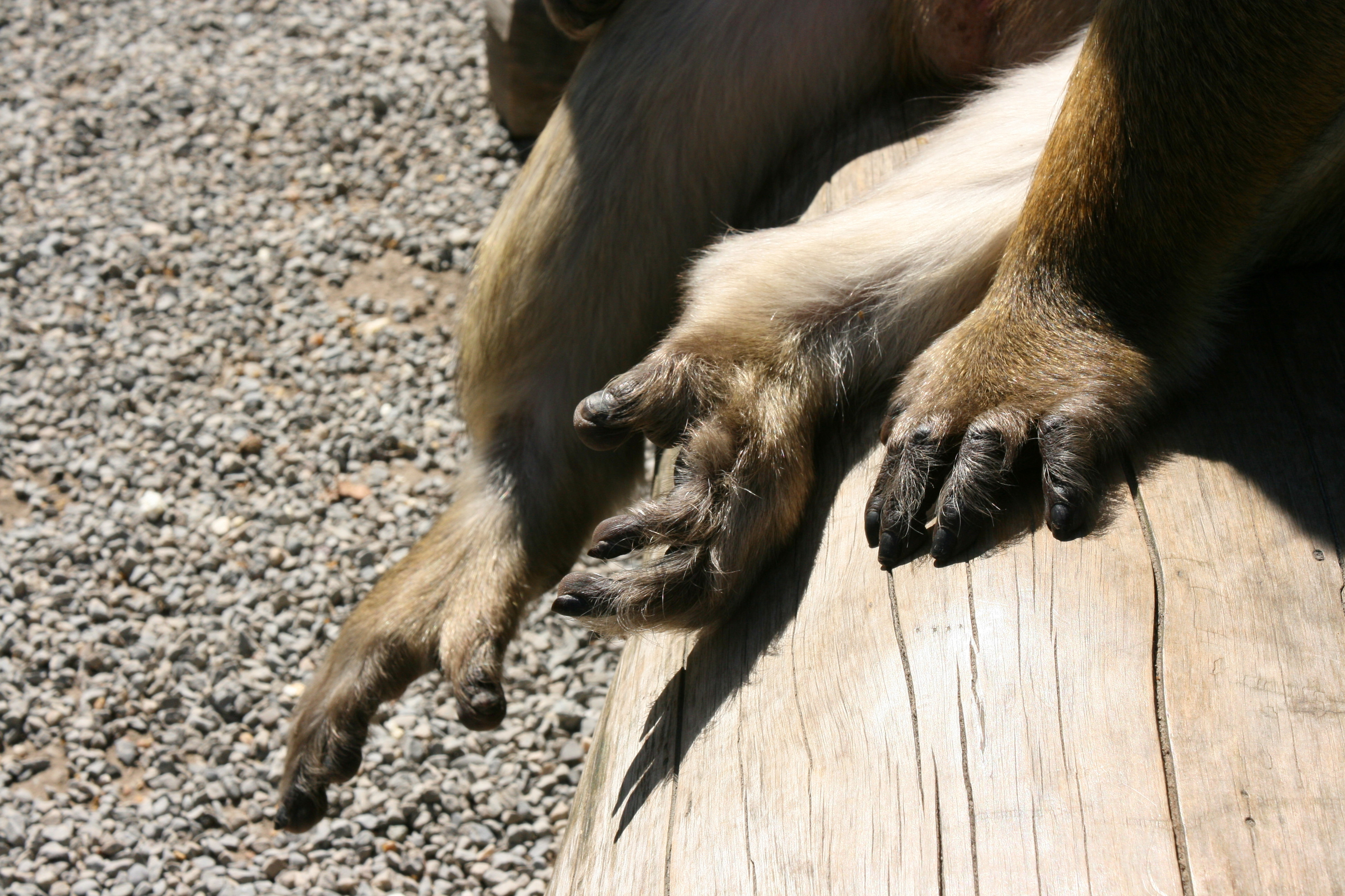 Affengehege mit Berberaffen (Macaca sylvanus) im Affenberg in Salem